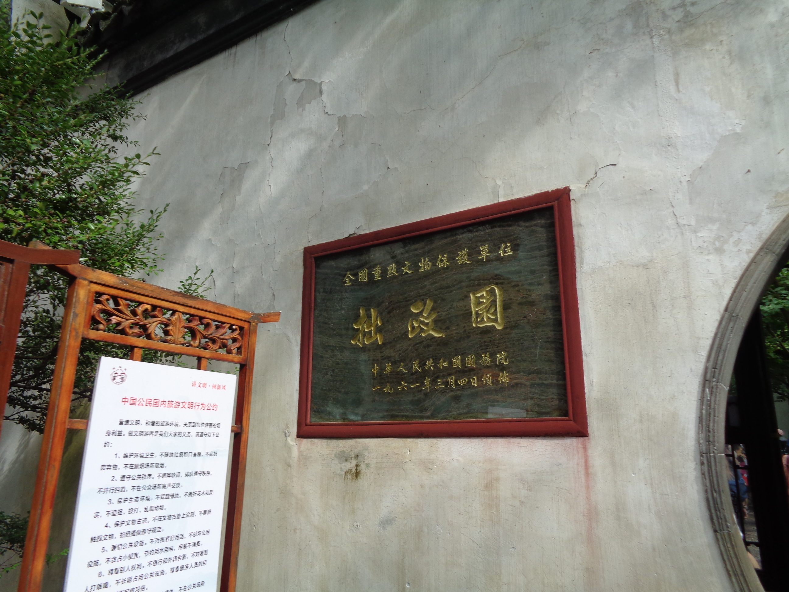 苏州姑苏拙政园内